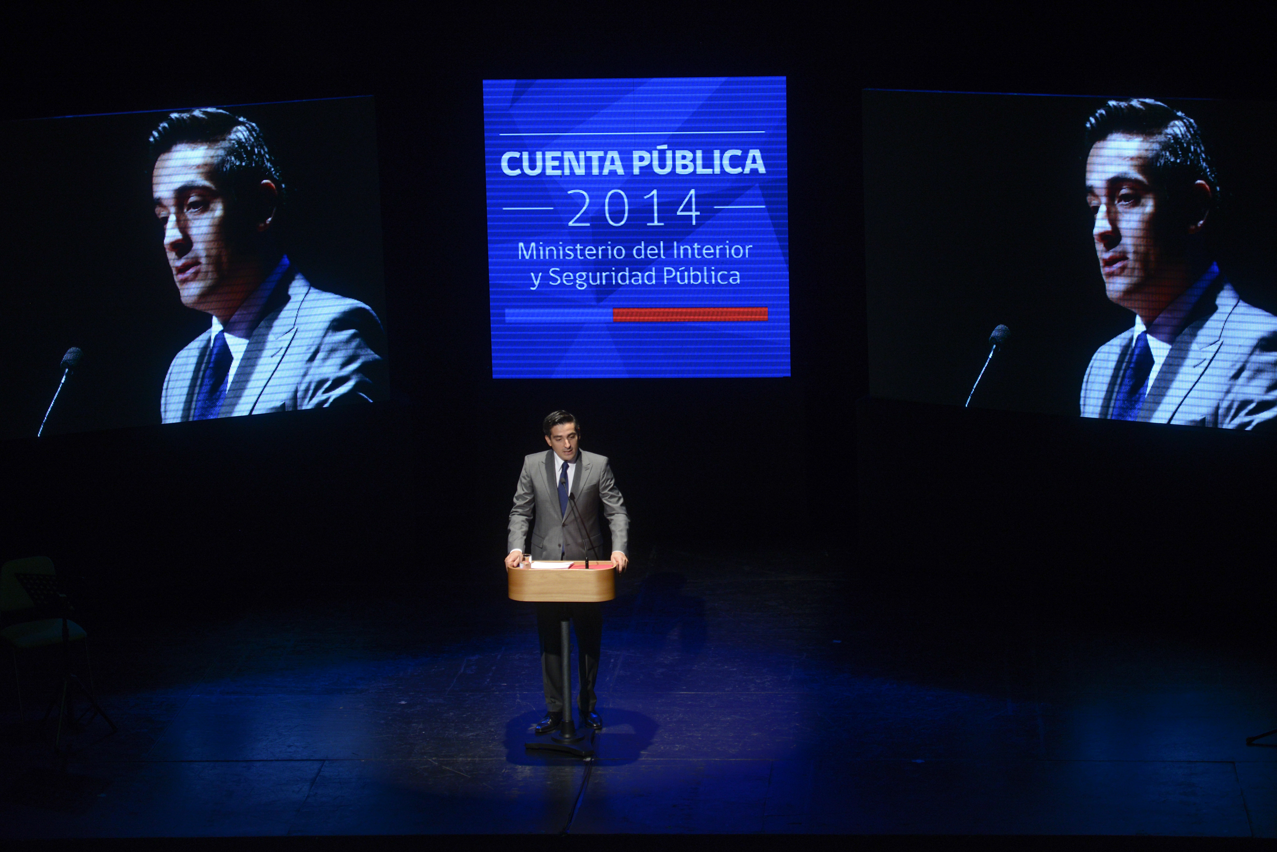 Ministro Álvaro Elizalde asiste a la Cuenta Pública del Ministerio del Interior y Seguridad Pública.